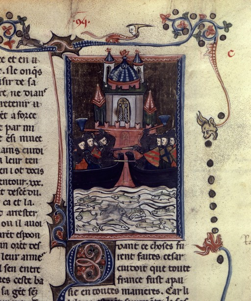 Bataille du Morbihan : Manuscrit du XIVème siècle Légende : bataille de vannes (-56) Auteur, titre : faits des romains Nom de pays : Italie Origine : Naples Siècle : 14ème siècle Date : entre 1324 et 1331